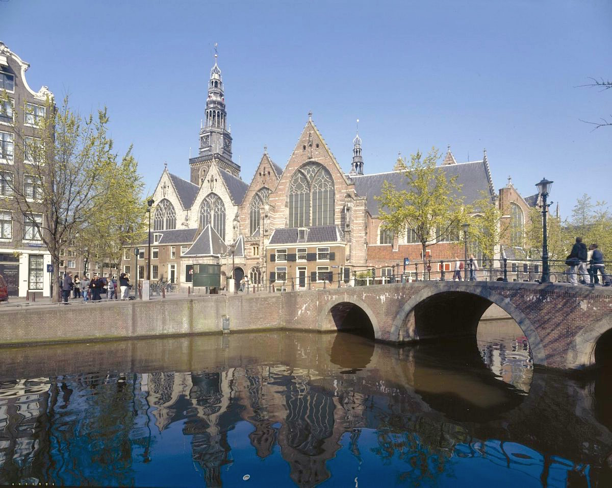 Oude Kerk: Overzicht met toren (opmerking: Gefotografeerd voor de omslag van: De Oude Kerk te Amsterdam, Bouwgeschiedenis en Restauratie van H.Janse)